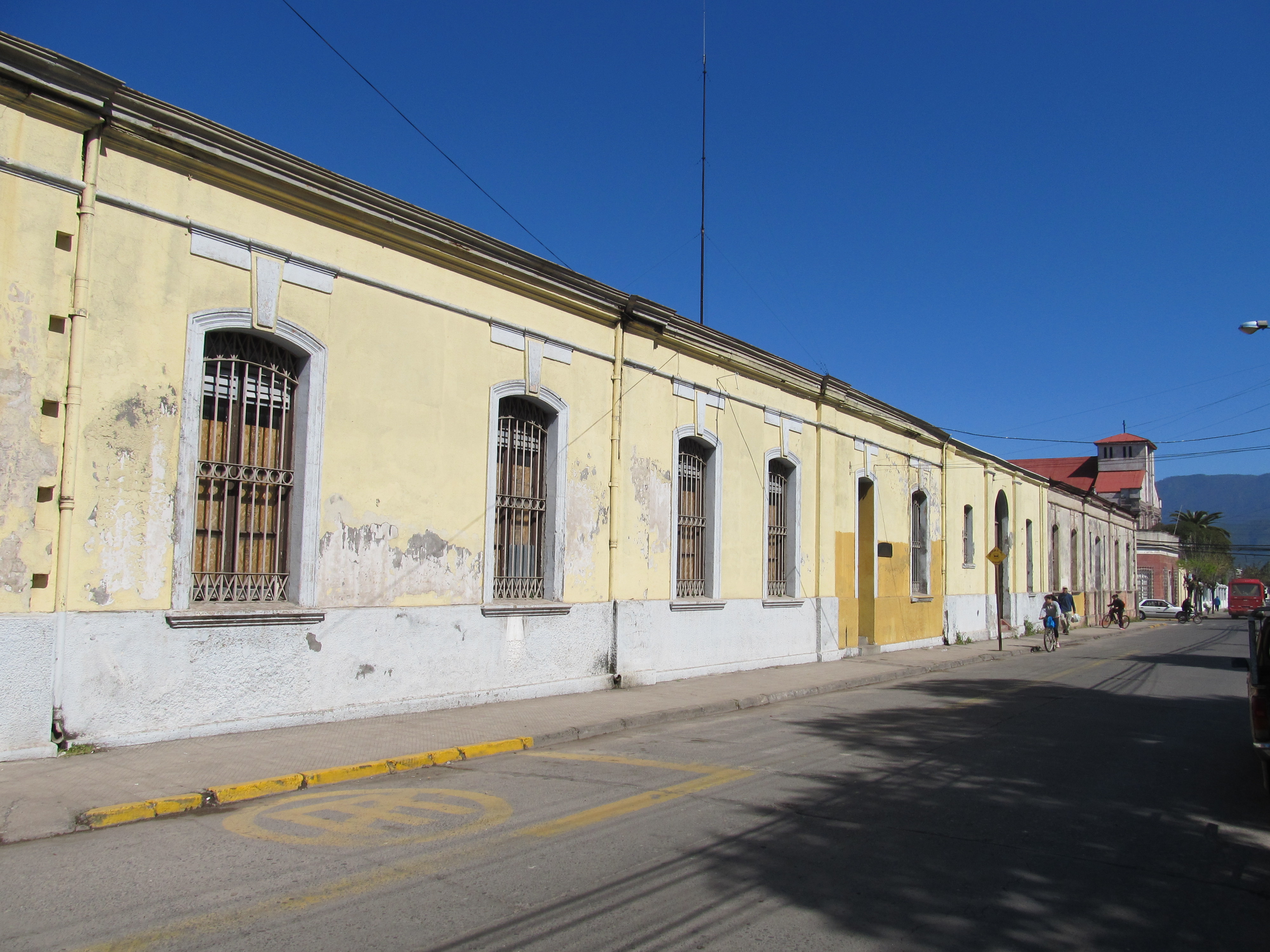 Cárcel de San Fernando This is a photo of a national monument in Chile: 2075